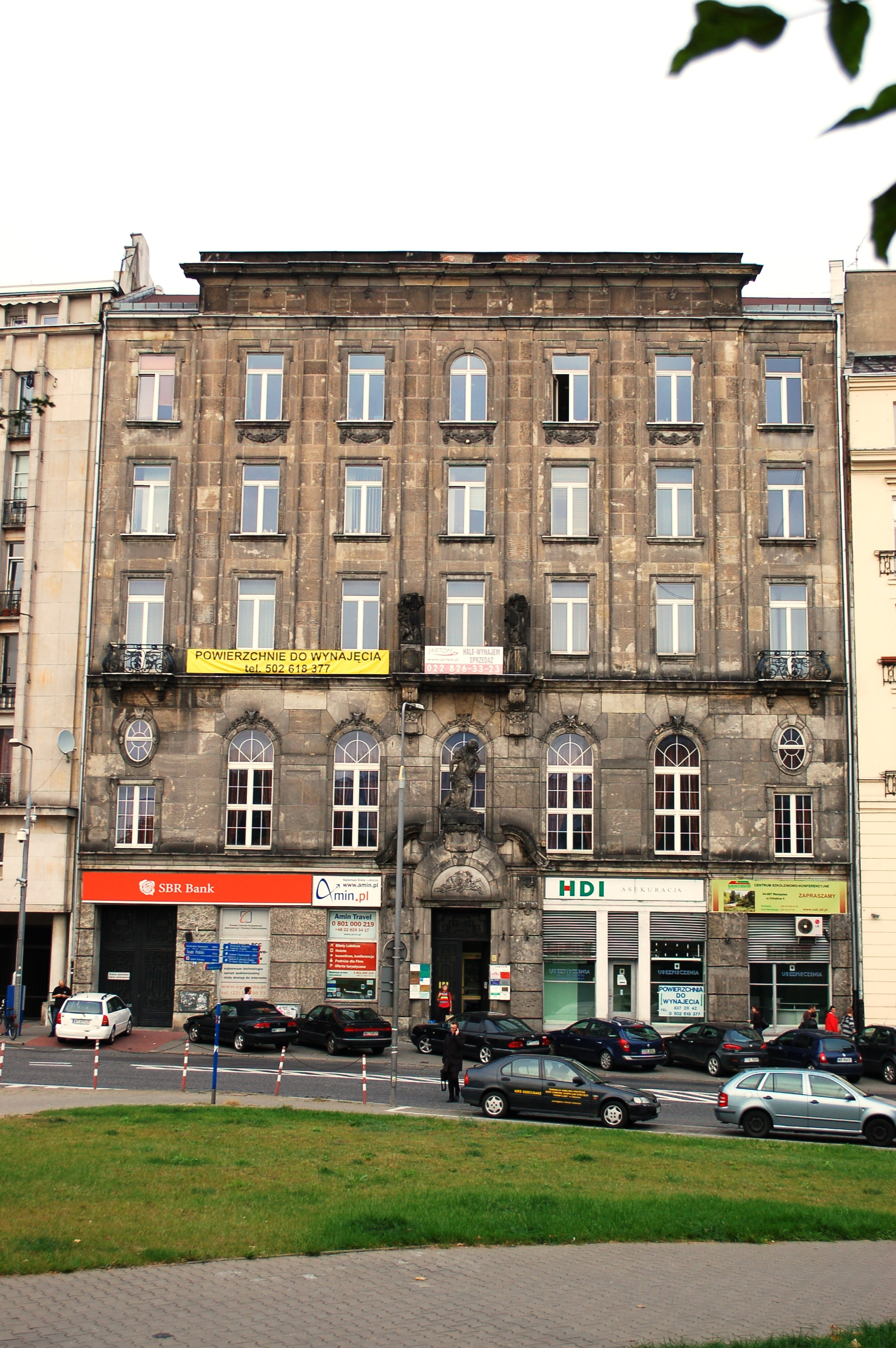 Warschau